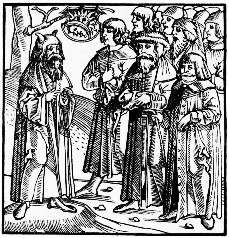 "Майсей перад народам" ("Моисей навчает людей Израилевых Второга закону"). Книги пятыи Моисеовы зовемыи от еврей Гельгадворимъ, по-греческий Девтерономосъ, по-латине Секунда лексъ, а по-руский Вторый законъ. Прага, 1519. Тытульны аркуш. 105Х104 мм.